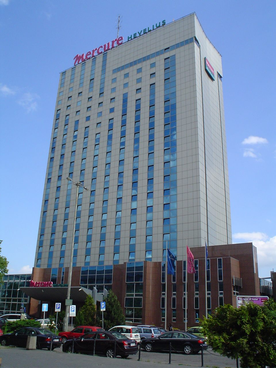 Hotel Mercure-Hevelius